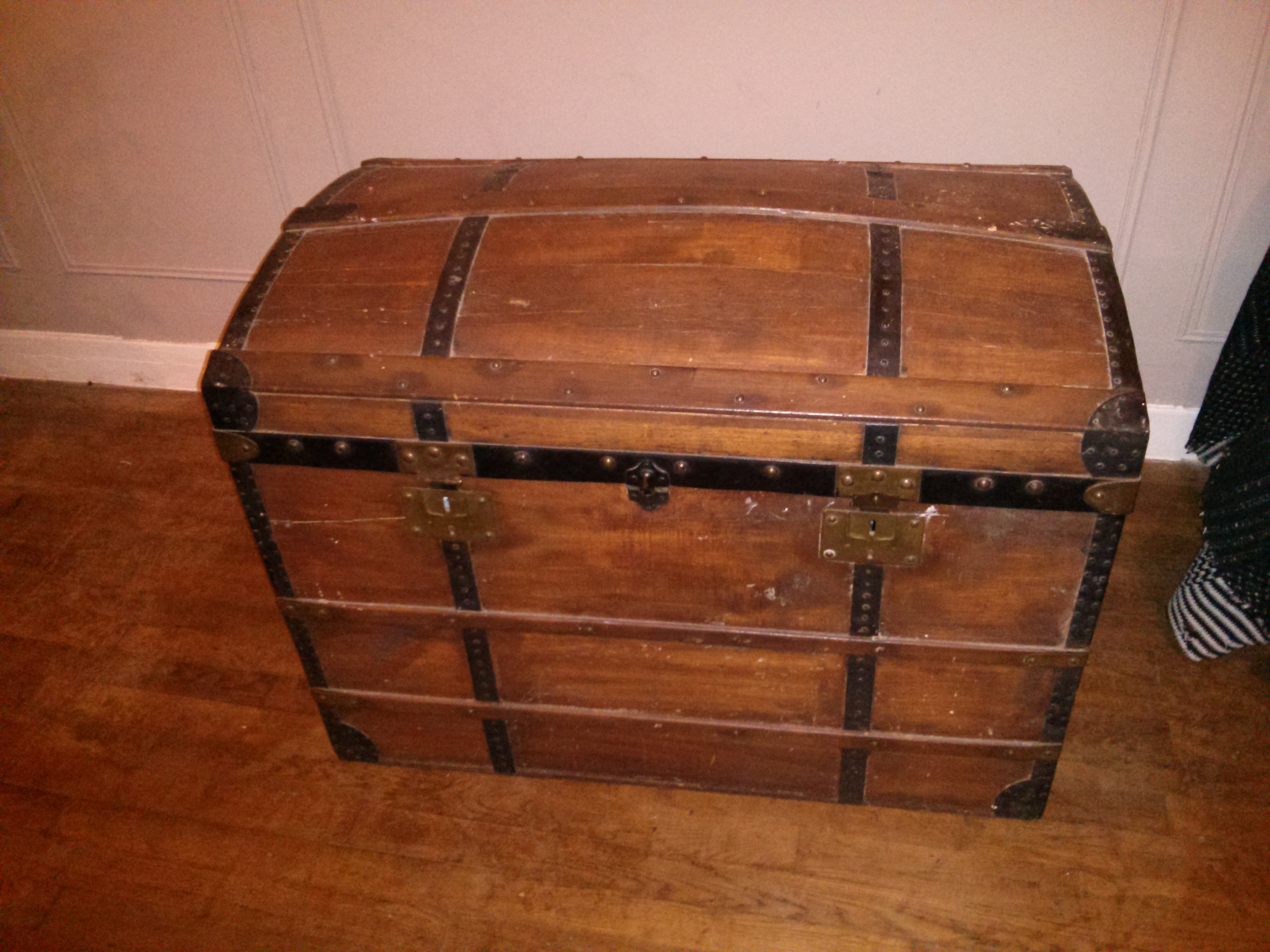 wood old